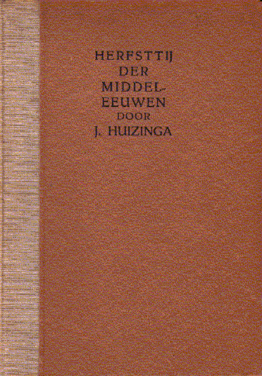 Cover of Dutch book Herfsttij der Middeleeuwen